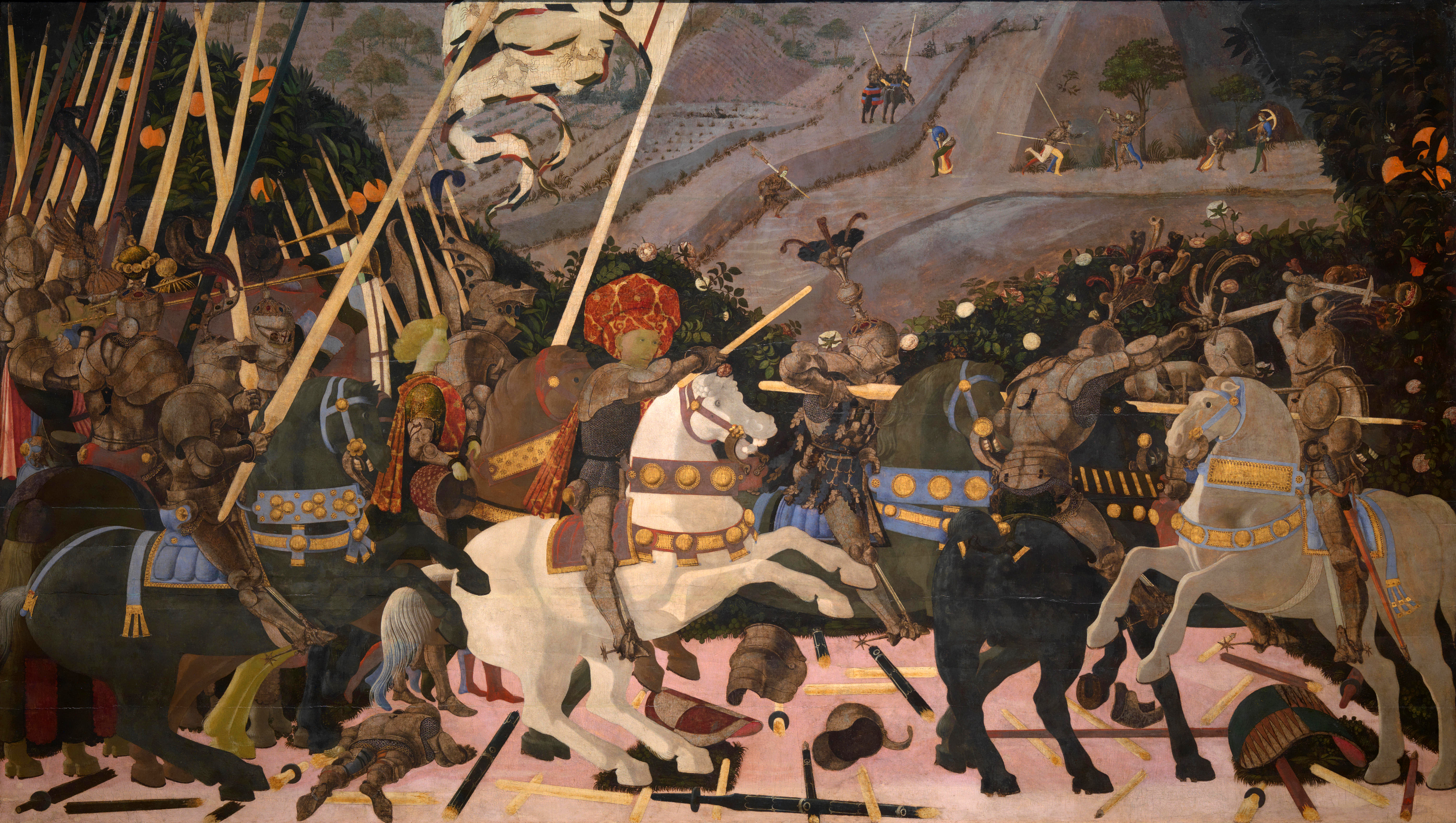 Niccolò da Tolentino Leads the Florentine Troops